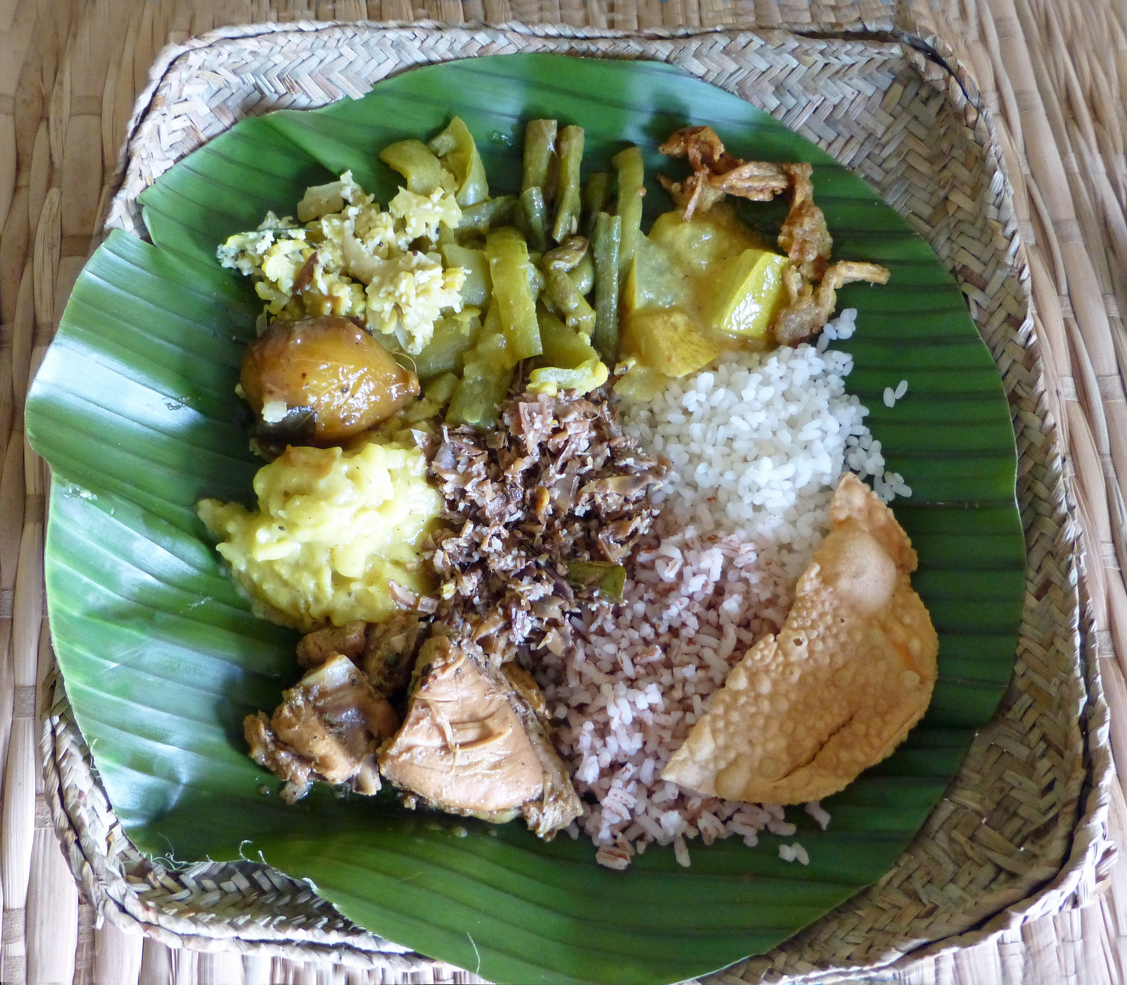 Assortiment de spécialités srilankaises présentées sur une feuille de bananier